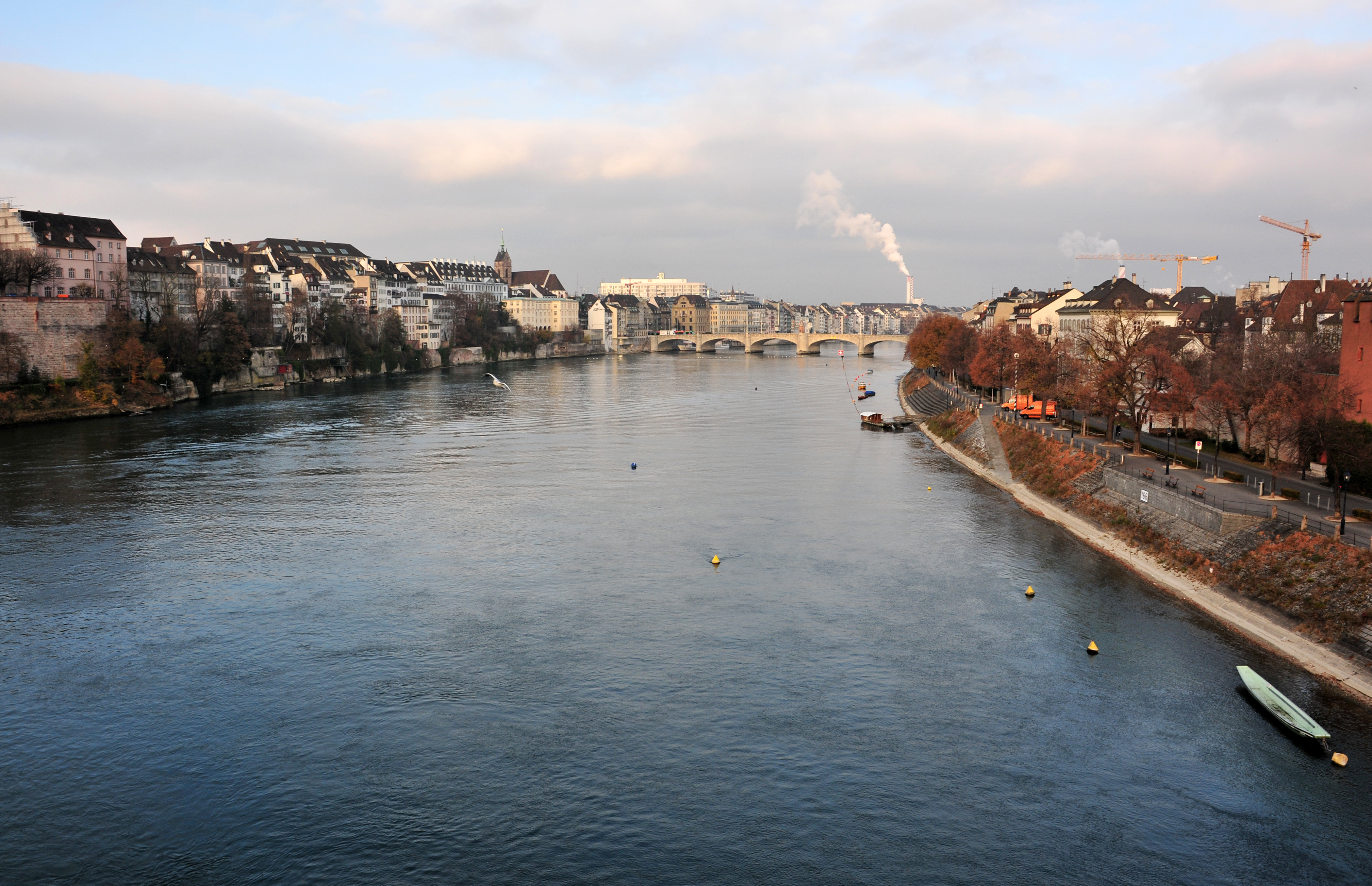 Basel